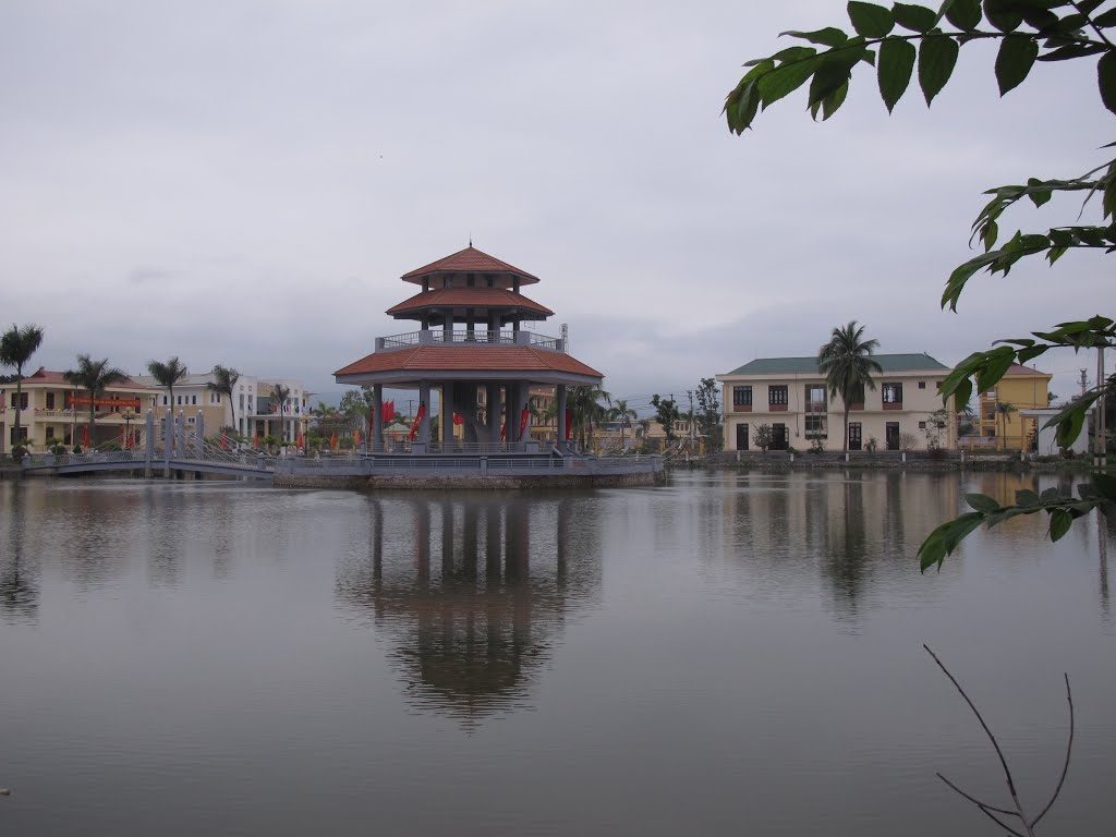 UBND Phường Phương Nam